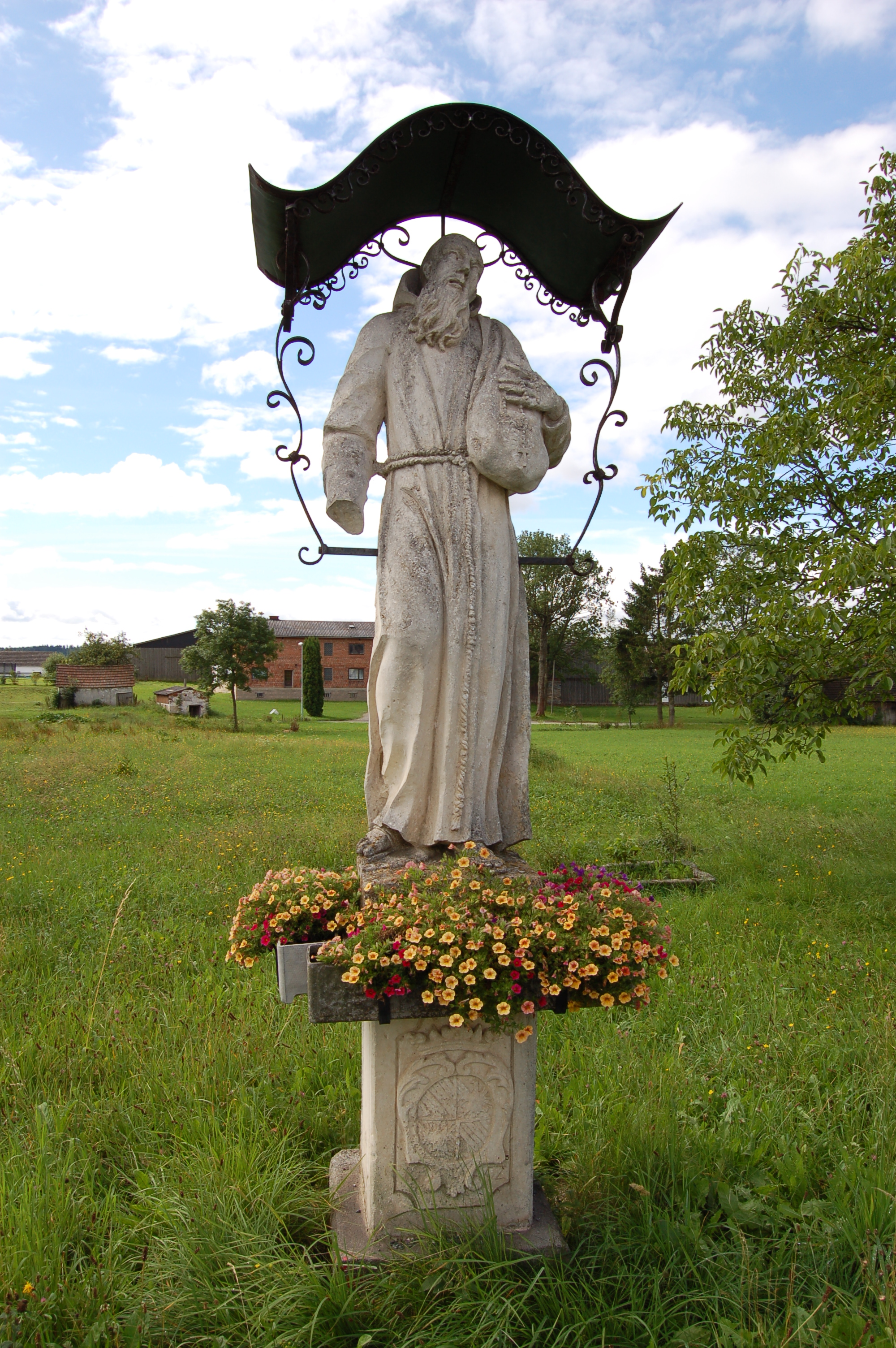 Statue des heiligen Felix von Cantalice in Sparbach, Gemeinde Vitis